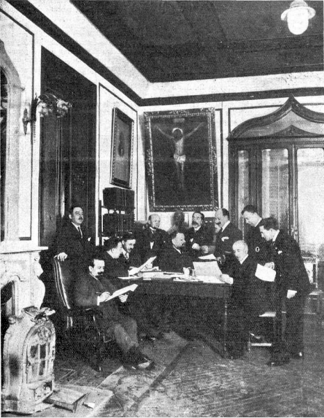 Dirección de El Siglo Futuro en el despacho del director